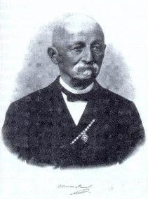 Salomon Reich (1817 - 1900), Židovský podnikatel ve sklářství a politik.